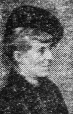 Anne de Tourville